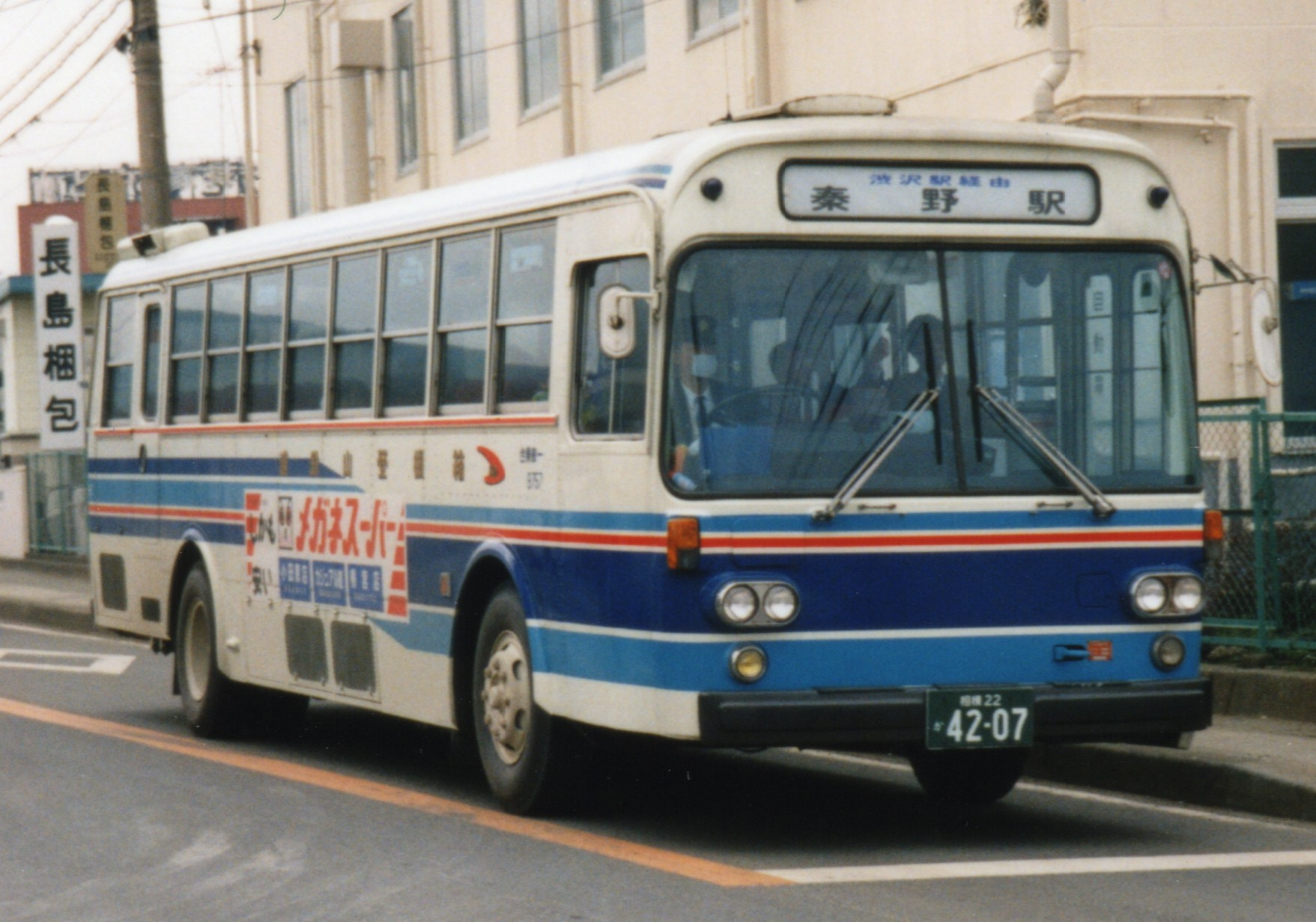 Hakone Tozan B757 Isuzu K-CJM550 from Kanachu in Hadano City